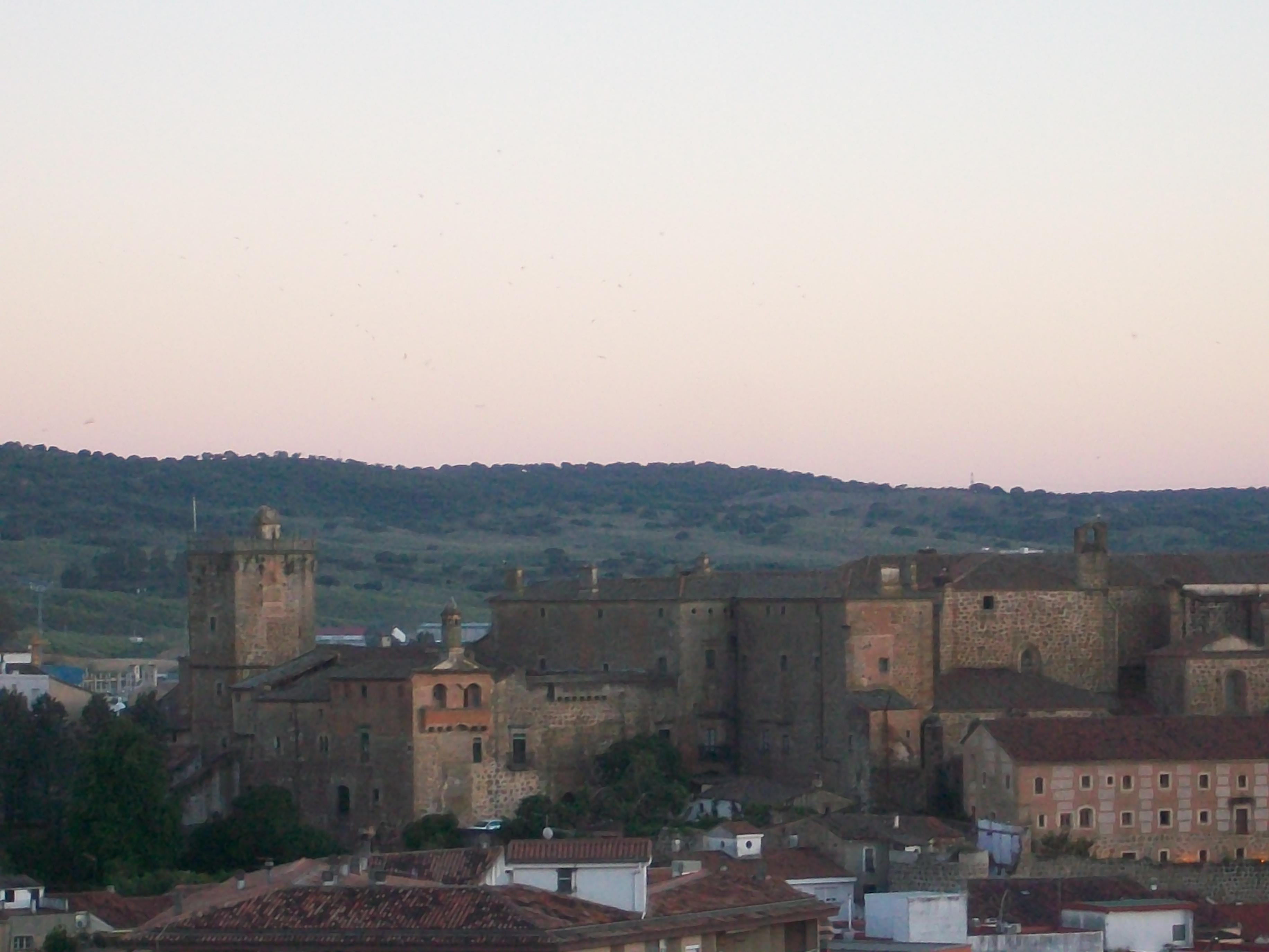 Vista parcial del palacio del Marqués de Mirabel, en Plasencia, Cáceres.